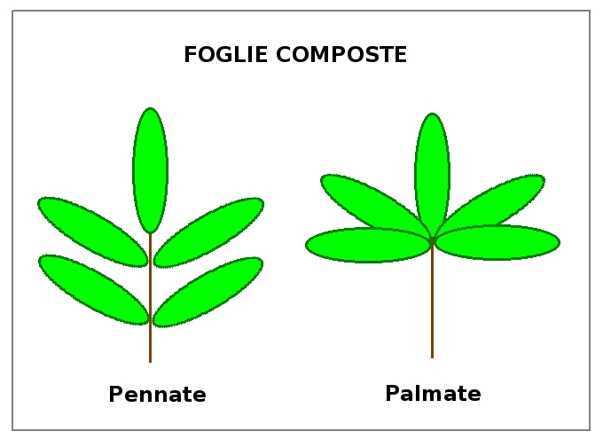 Cardamine bulbifera DIS01